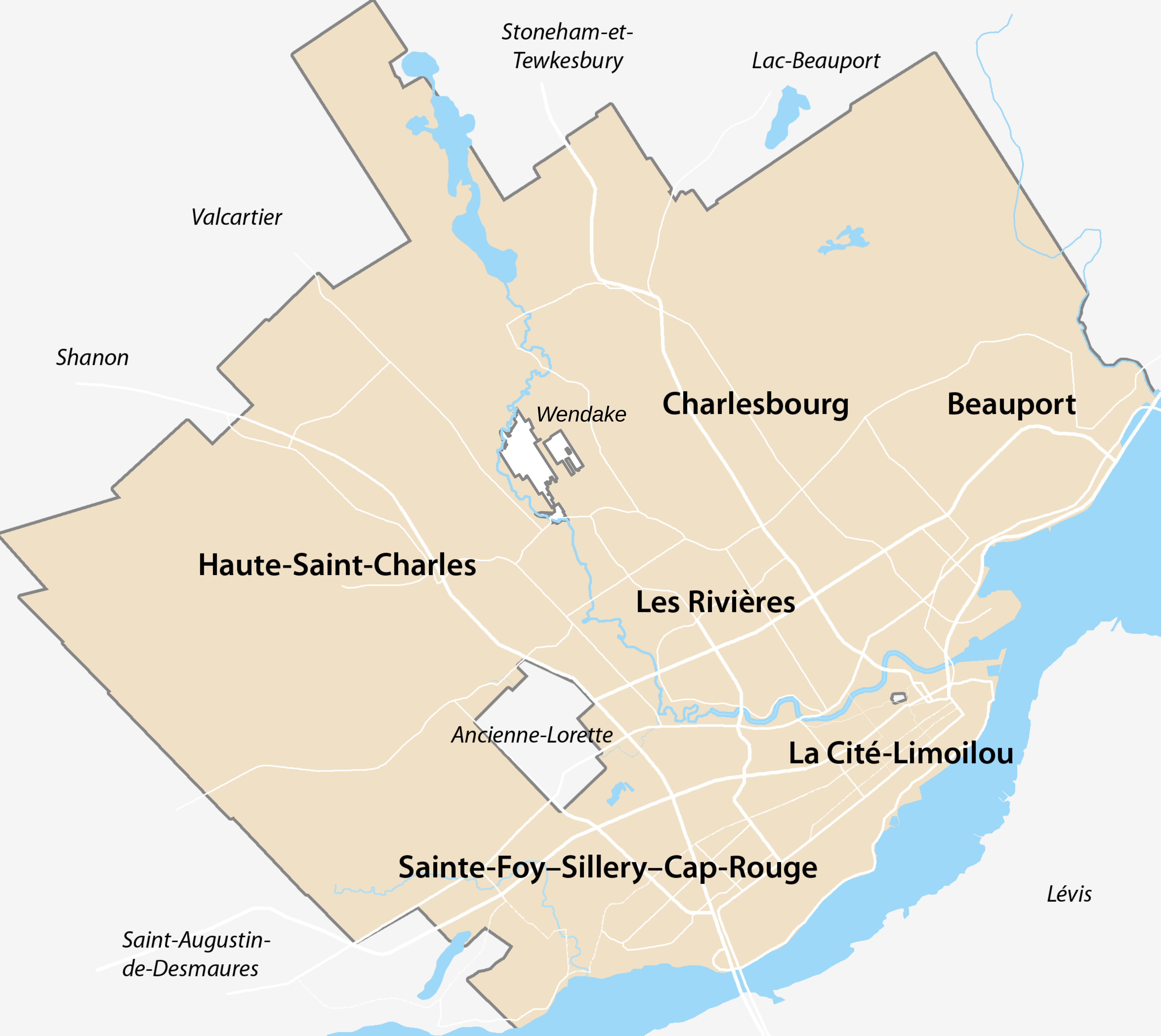 Carte géographique de la ville de Québec